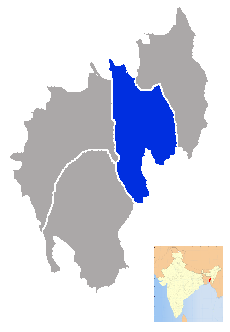 Dhalai district in Tripura